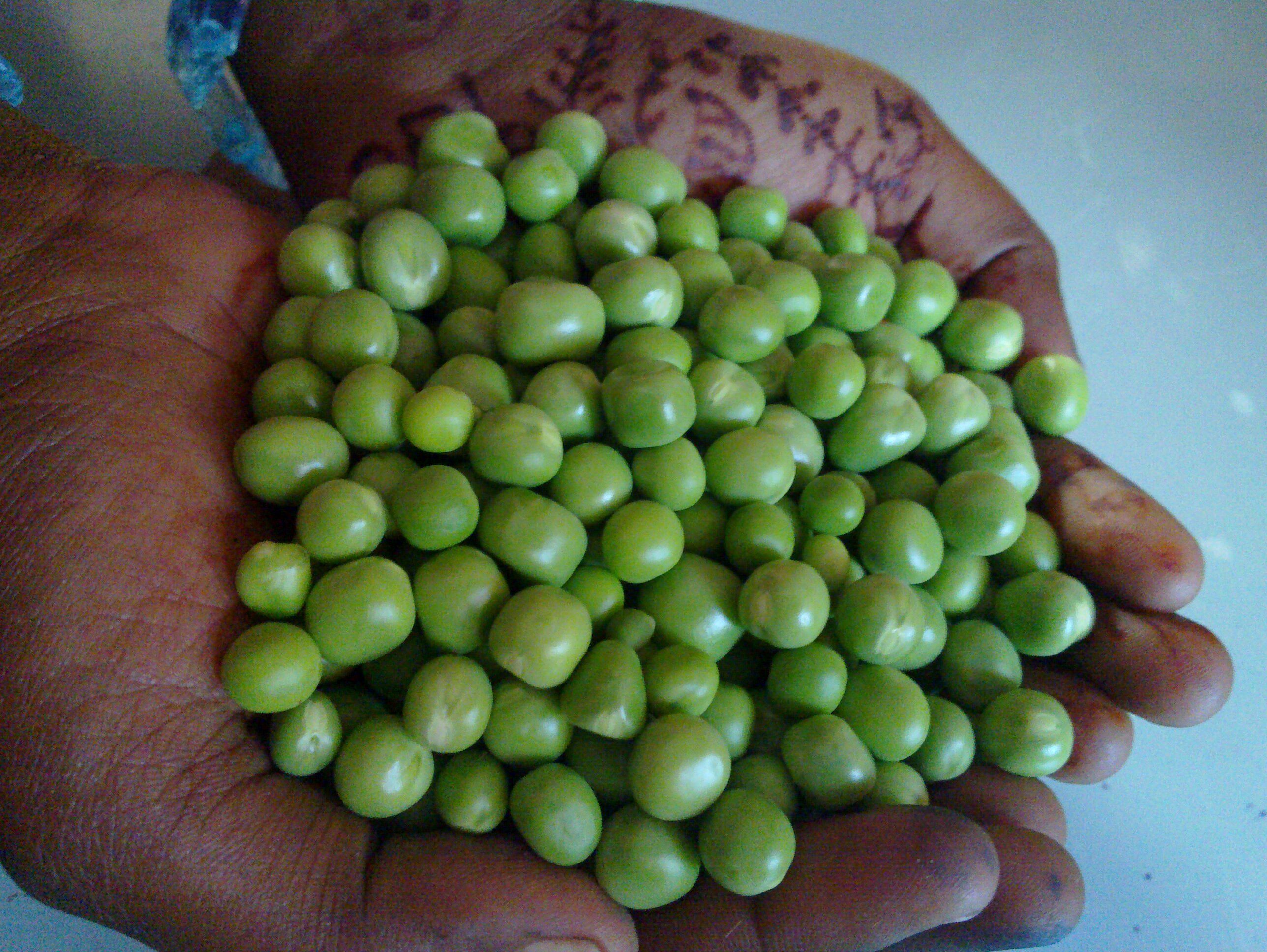 Green peas